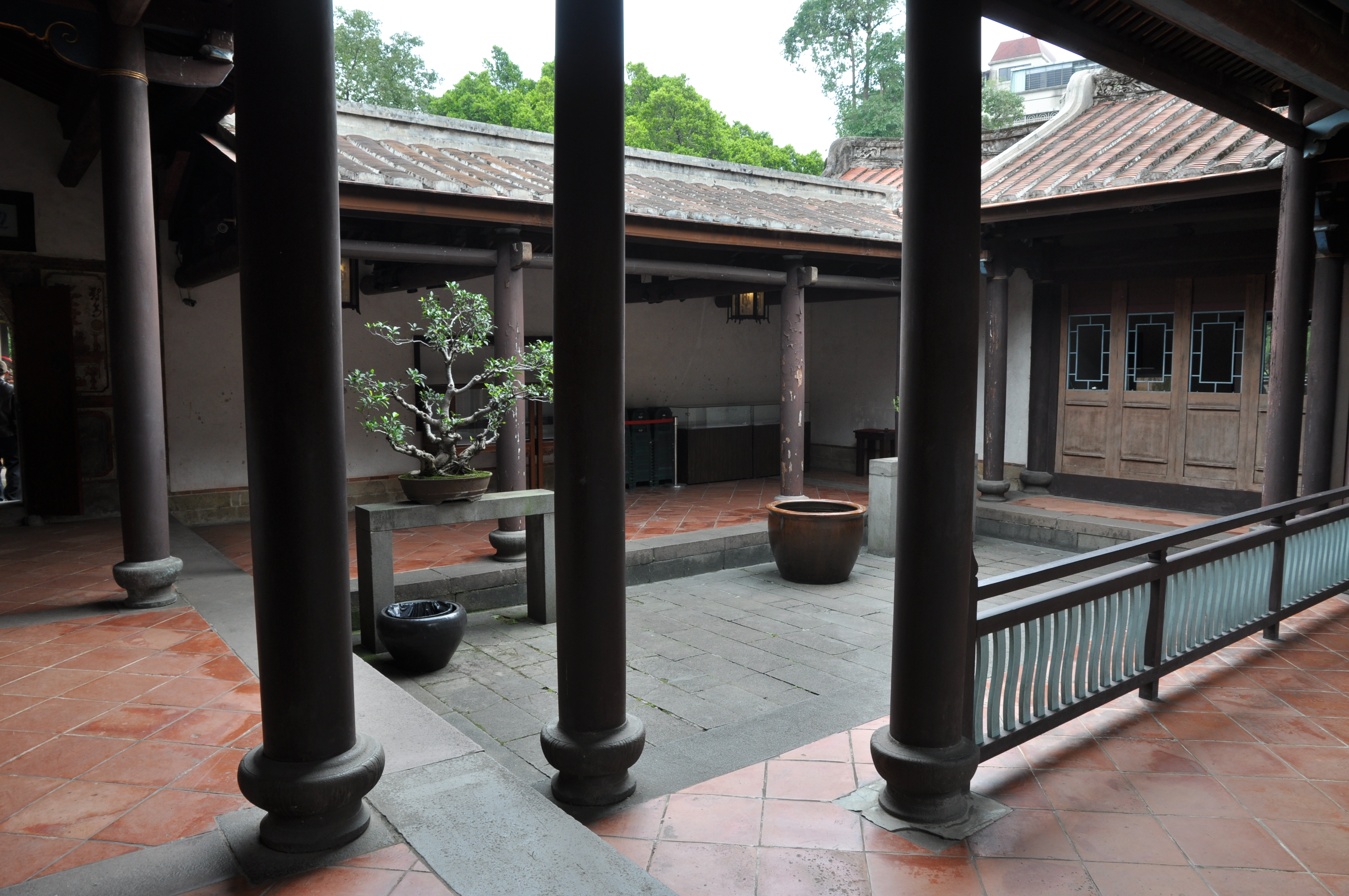 The Lin Family Mansion and Garden - Xinbei